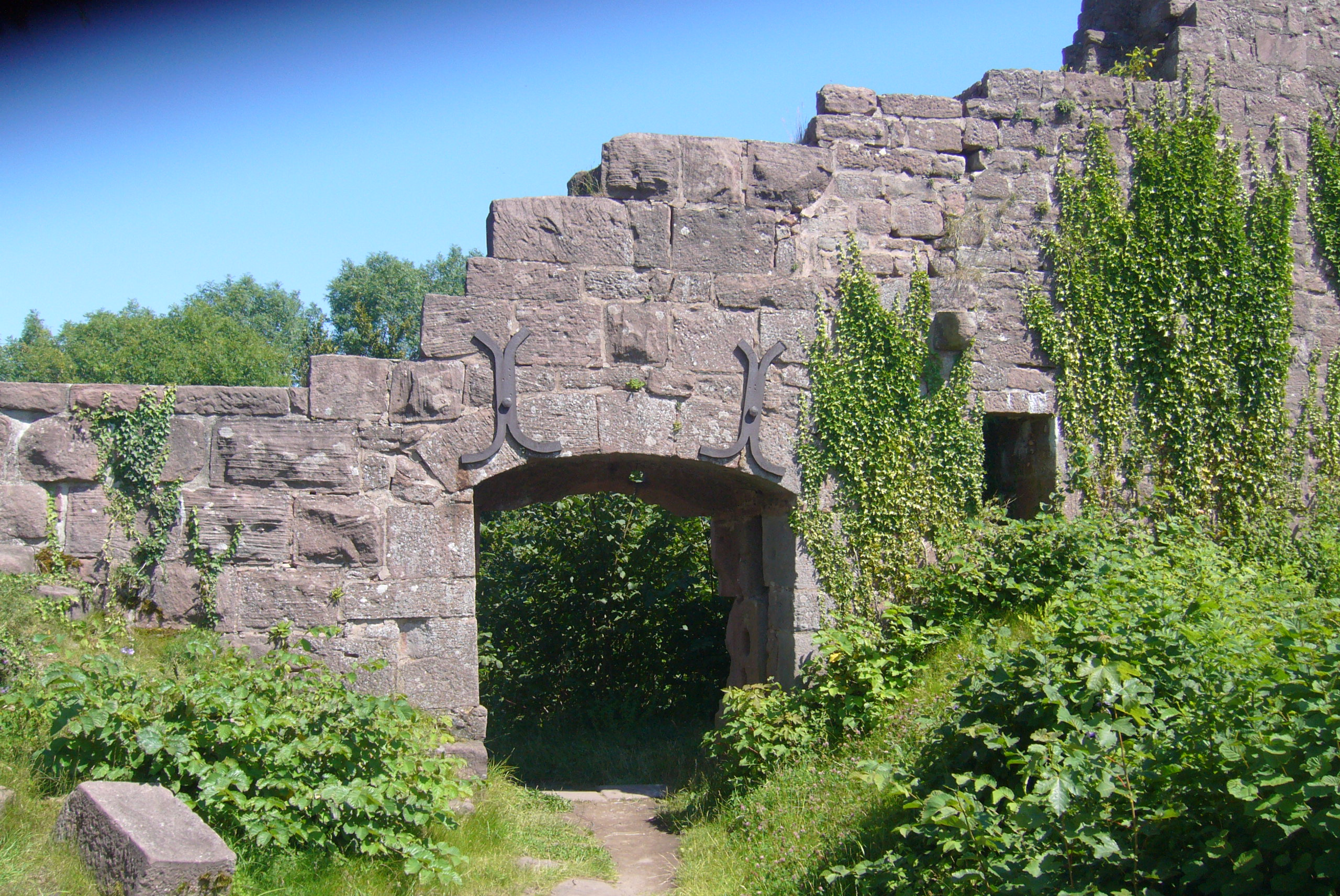 Château du Frankenbourg 036.JPG